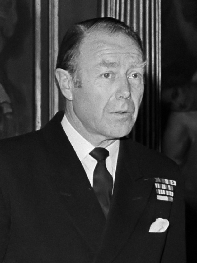 Hare Majesteit koningin Juliana ontvangt Sir John Treacher, commissaris chief channel, op Huis ten Bosch 14 februari 1977